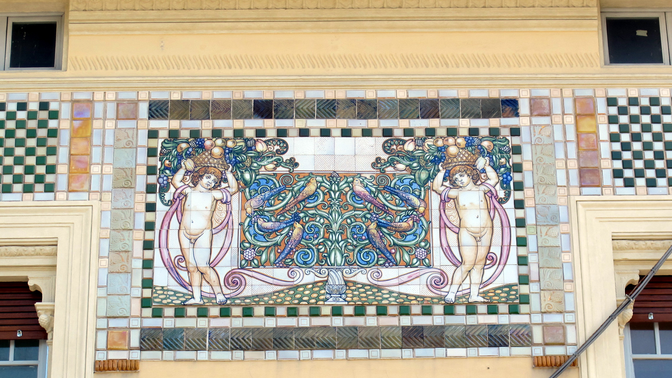 Villa argentina, viareggio, cercamiche di galileo chini